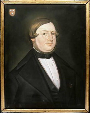 Portret van Johannes Haitsma Mulier (1811-1859) door onbekende schilder (eerder toegewezen aan Berend Kunst).